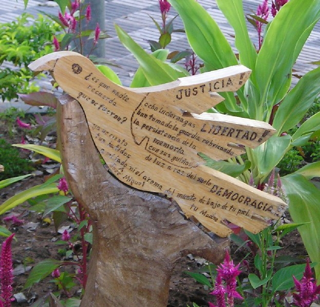 Marzo Paraguayo. Escultura en memoria de los caídos en la Plaza Independencia de Asunción. Realizada por la madre de José Miguel Zarza. Paraguayan March. Memorial Sculpture for the fallen activists at Plaza Independencia, Asuncion. Made by José Miguel Zarzas's mother. Zarzas was one of the murdered.